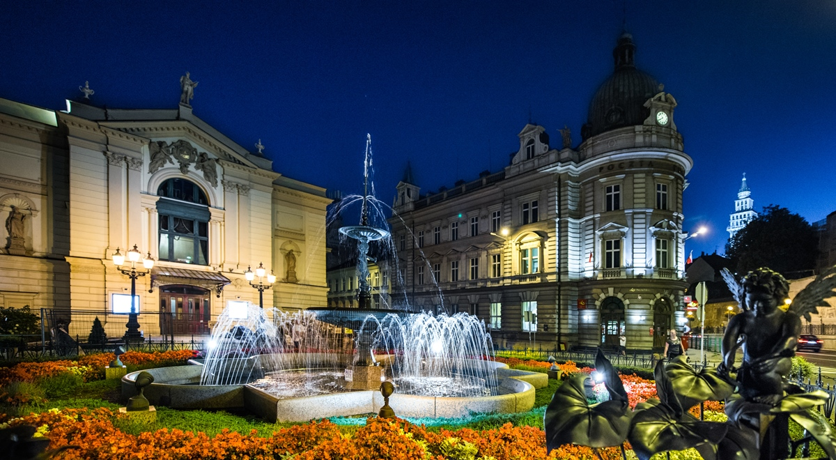 Bielsko-Biała Teatr Polski Poczta